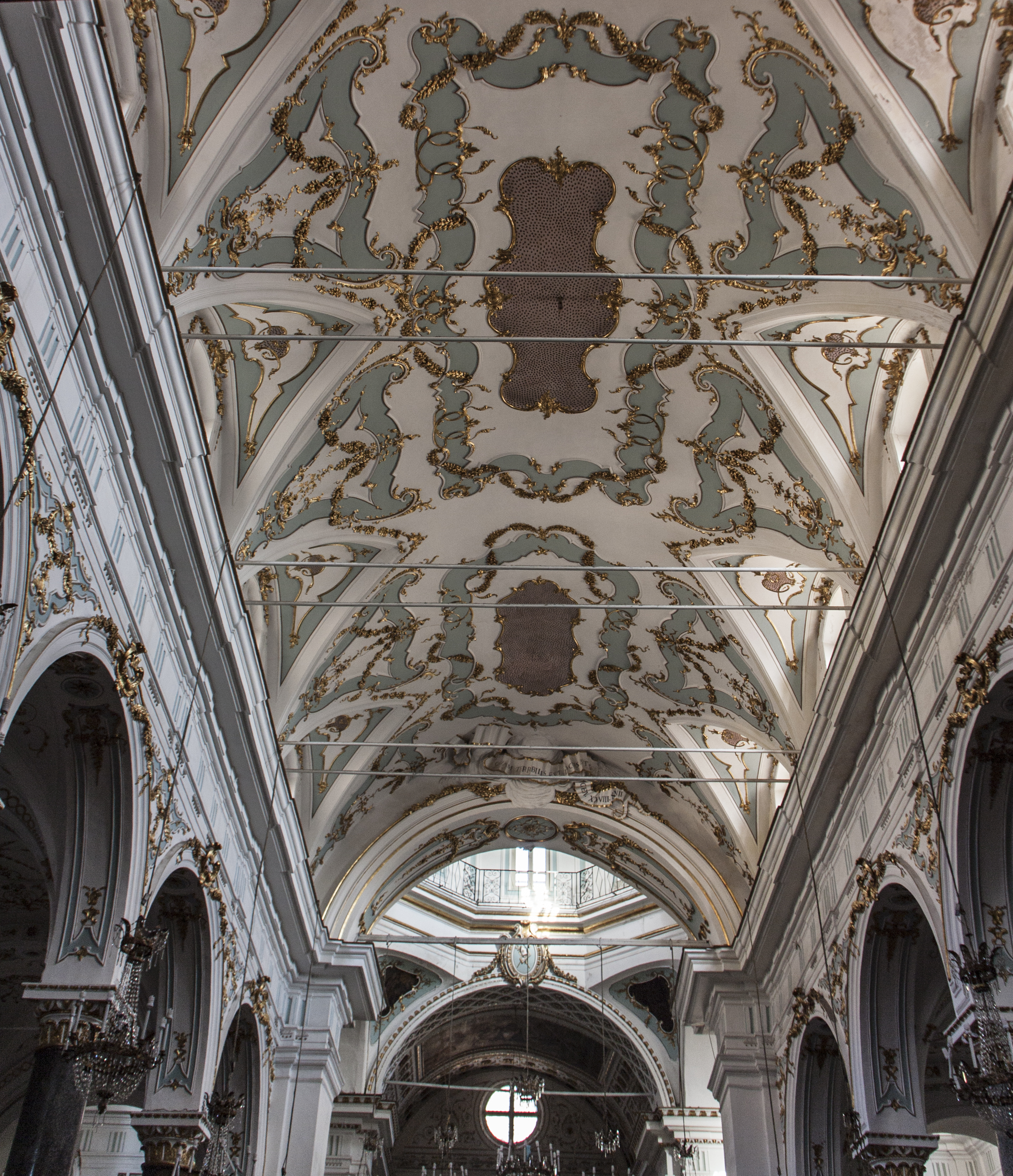 Matrice di Gangi